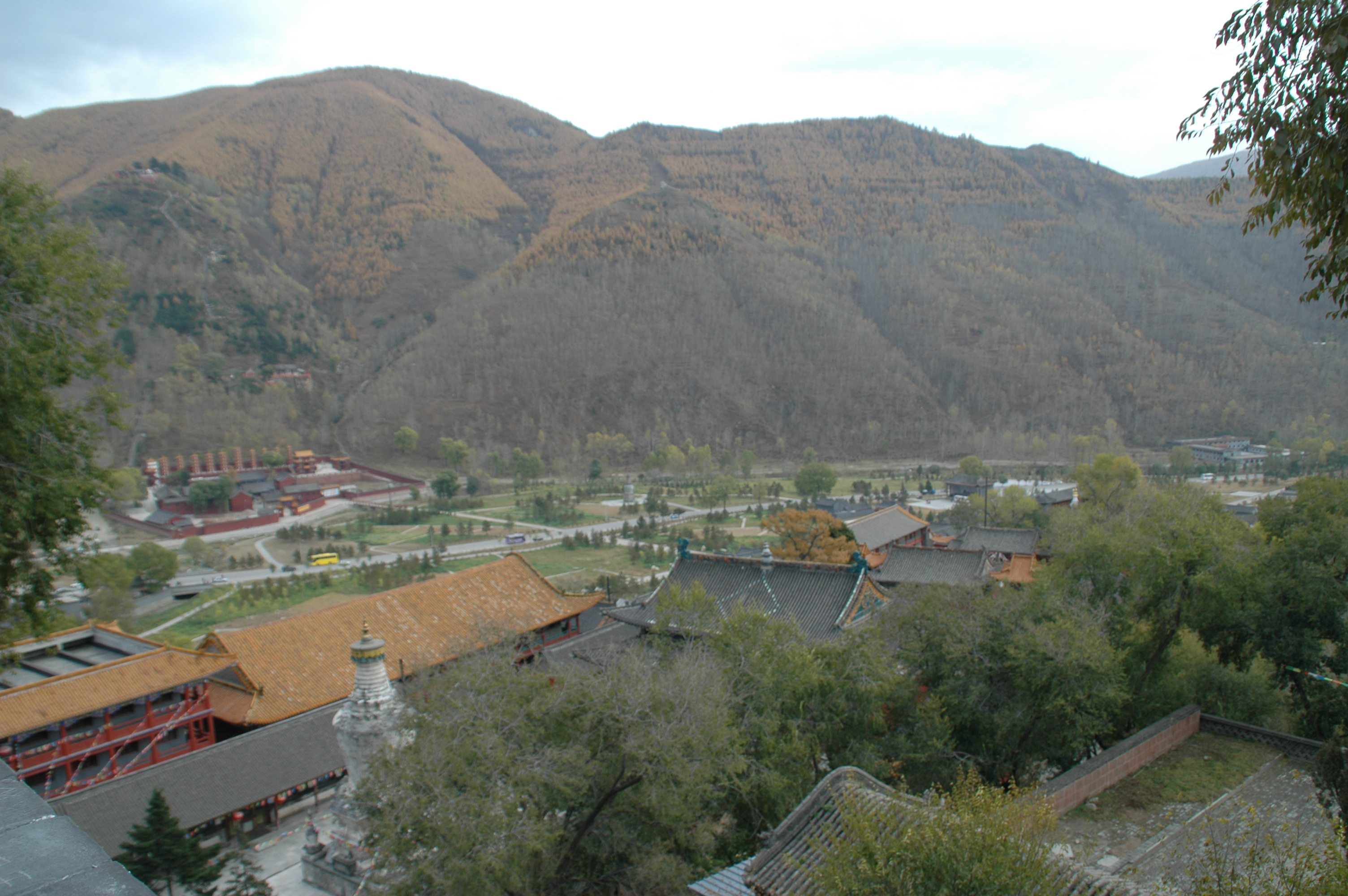 351中國山西五台山世界遺產China Mount Wutai Mountain World Heritage in China